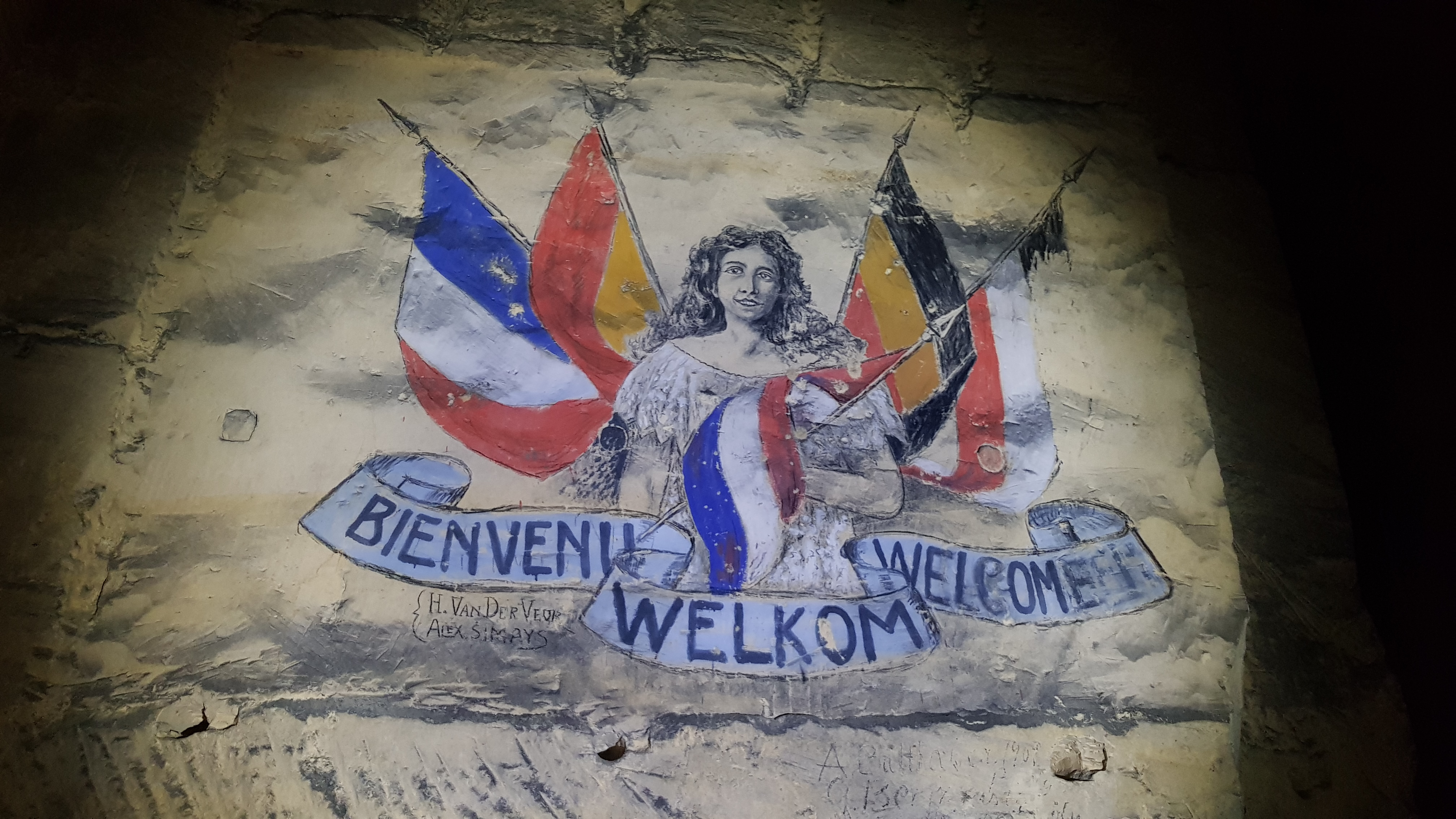 Gangenstelsel Zonneberg in de Sint-Pietersberg, Maastricht, Nederland